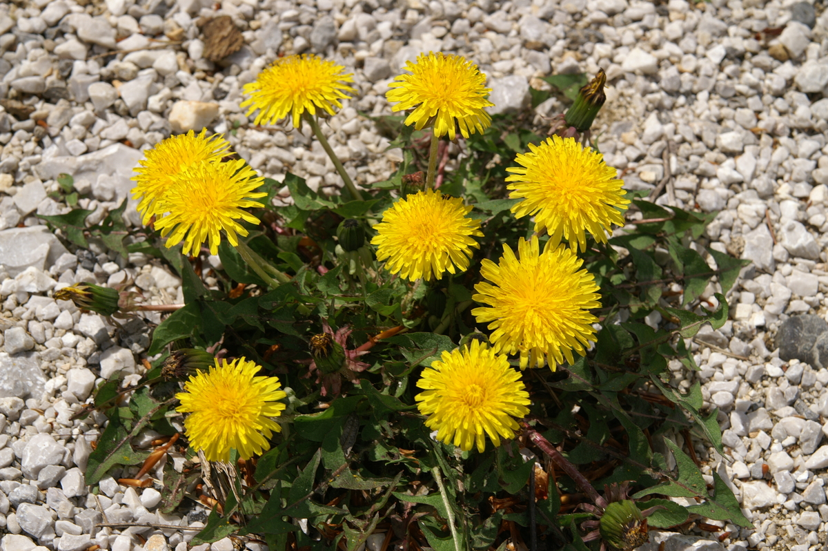 Navadni regrat na Toškem Čelu.